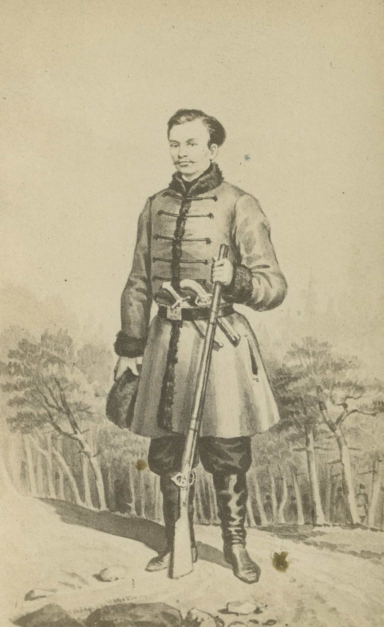 Portret powstańca styczniowego Józefa Budkiewicza